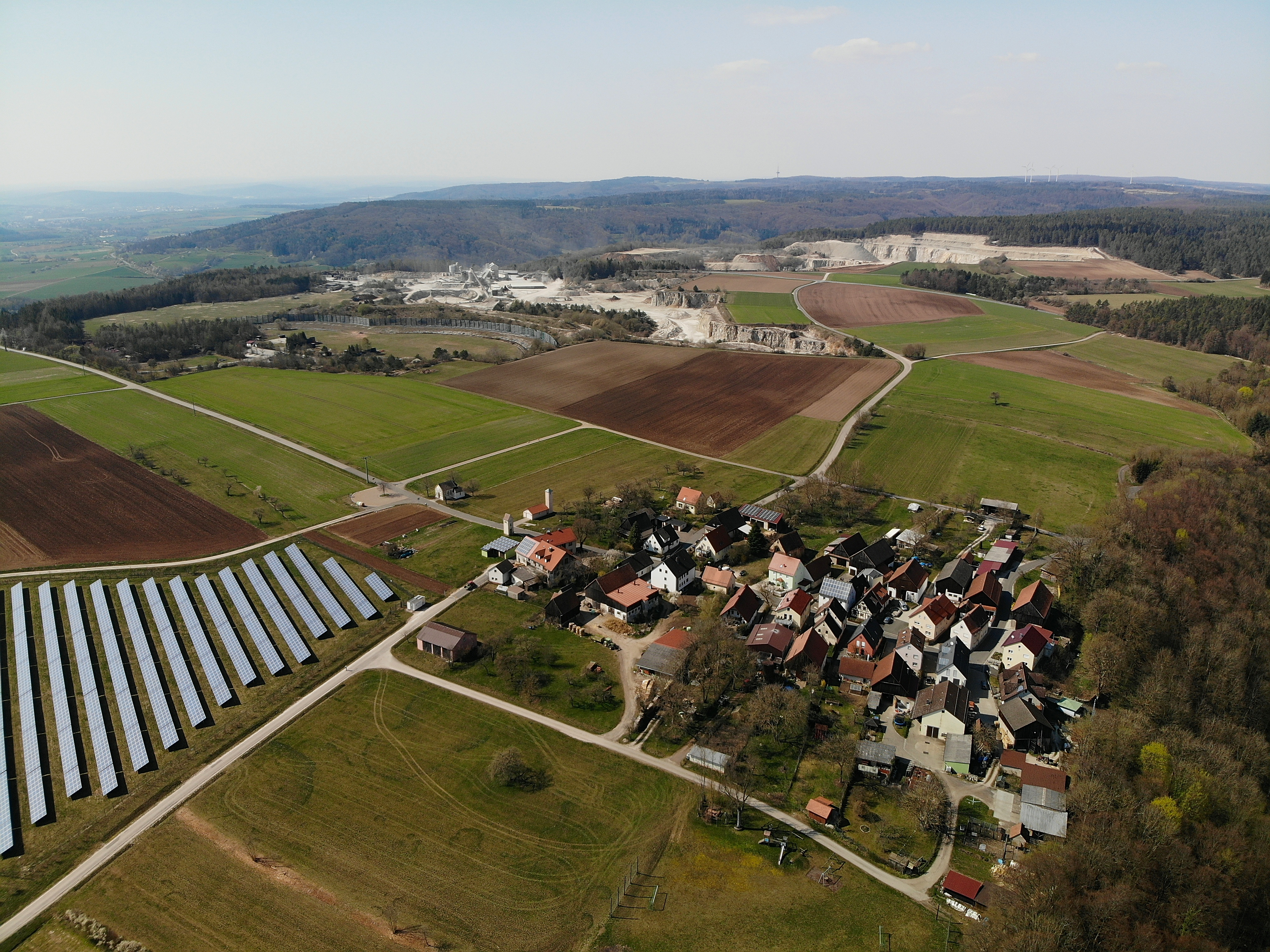 Eschlipp (Ebermannstadt) Luftaufnahme (2020)